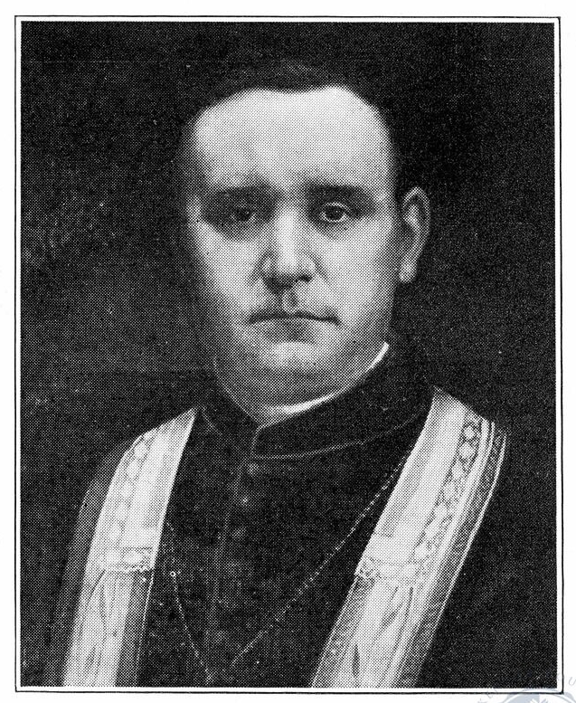 Bischof Augustus Maria Toebbe (1829-1884), von Covington, Kentucky